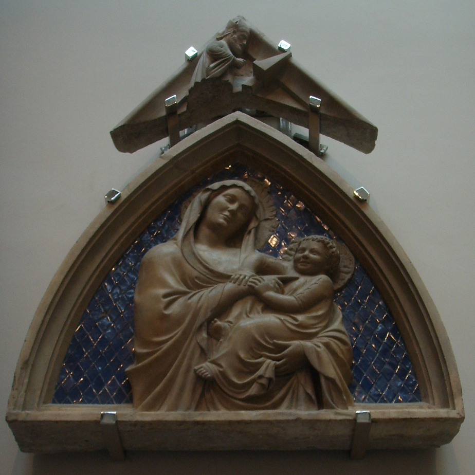 Losanga 25, madonna col bambino (lunetta), andrea pisano 1337-1341